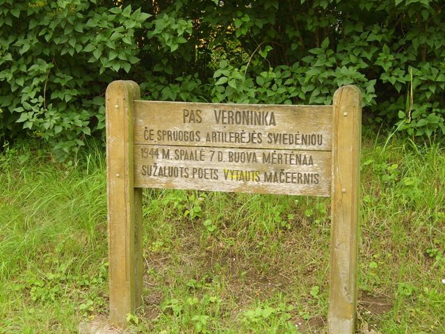 Vytauto Mačernio žuvimo vieta Žemaičių Kalvarijoje Nuotraukos autorius: Tadas12